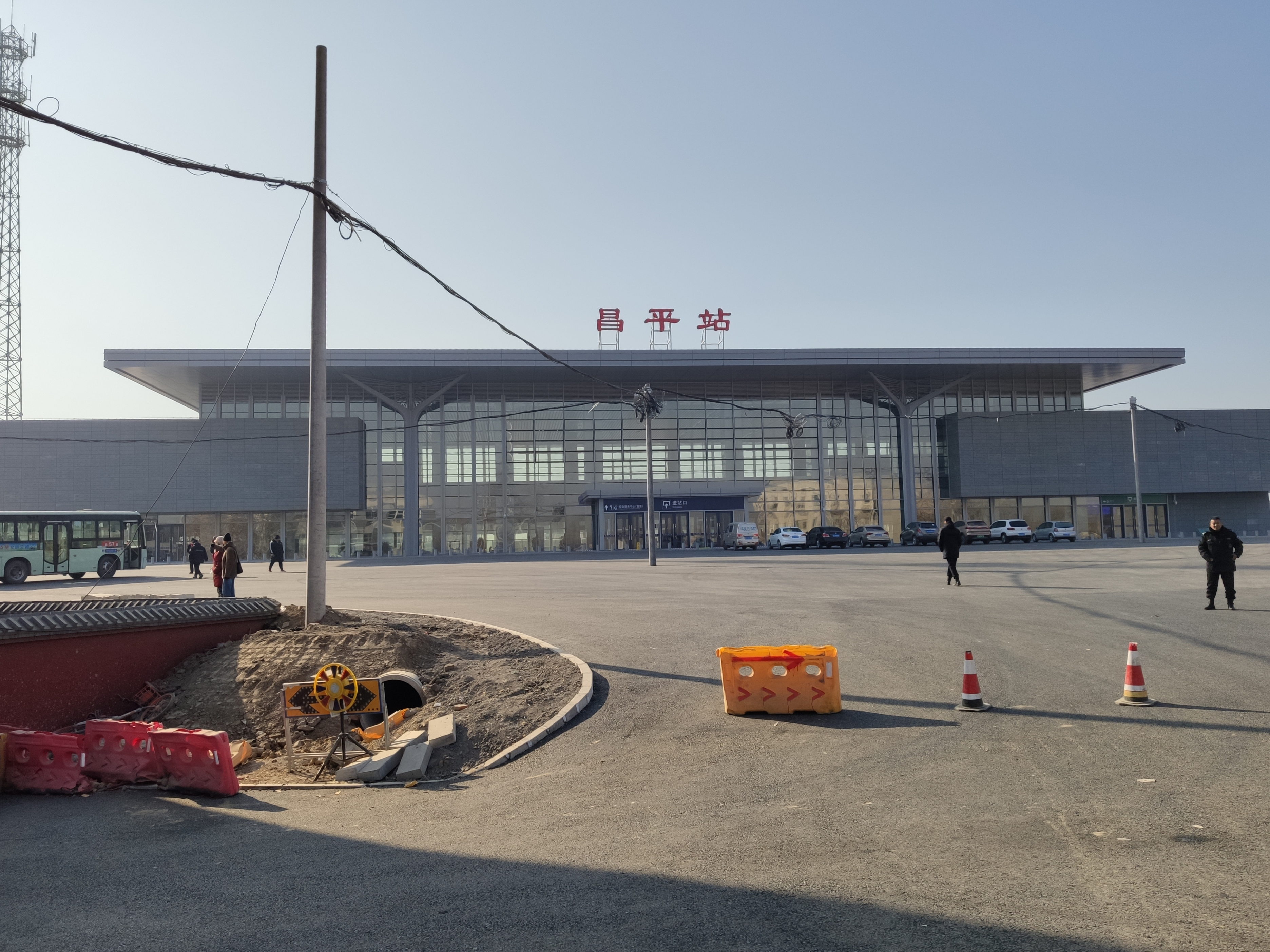 京张高铁昌平站新站房